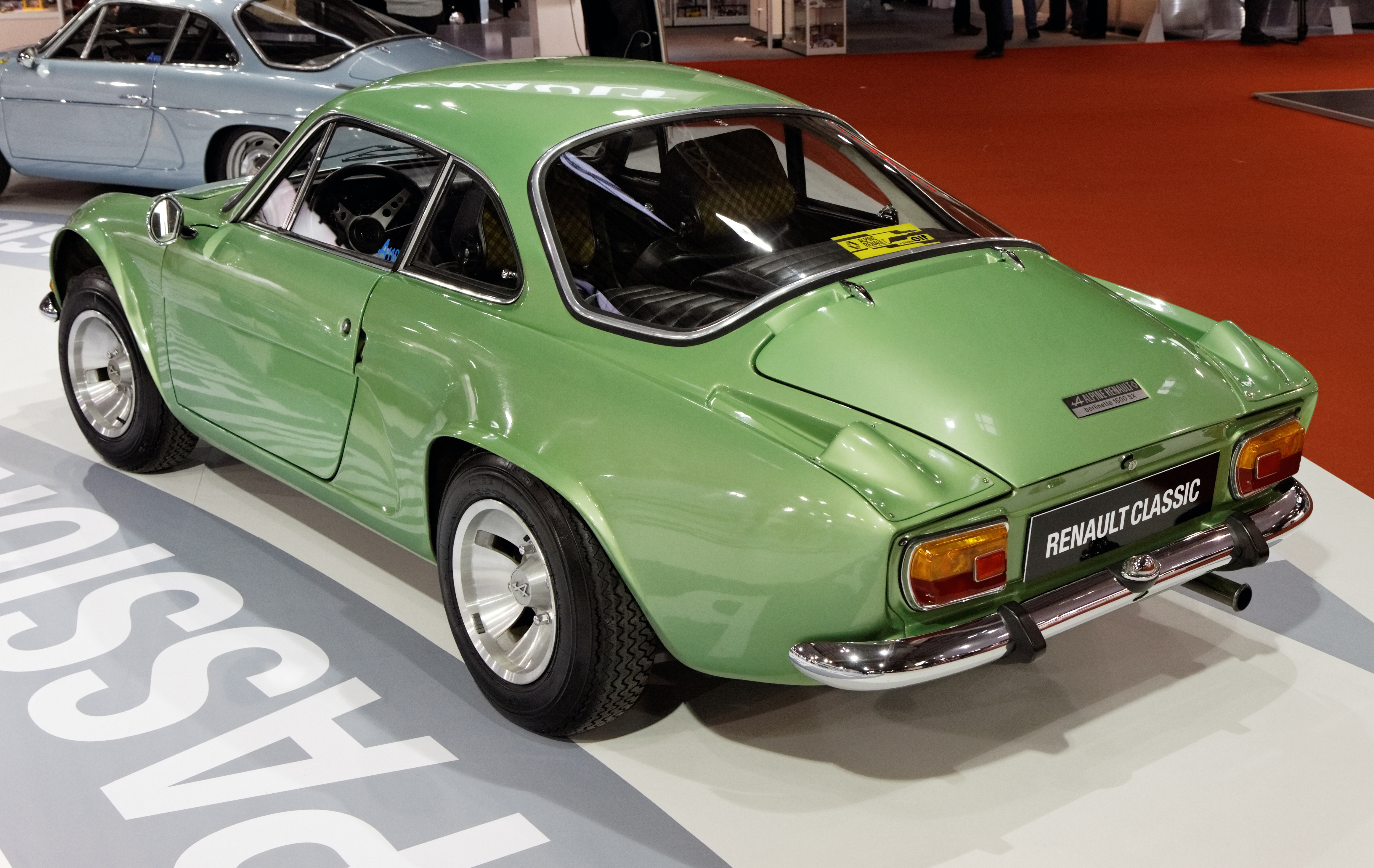 Renault Alpine A110 Berlinette 1600SX